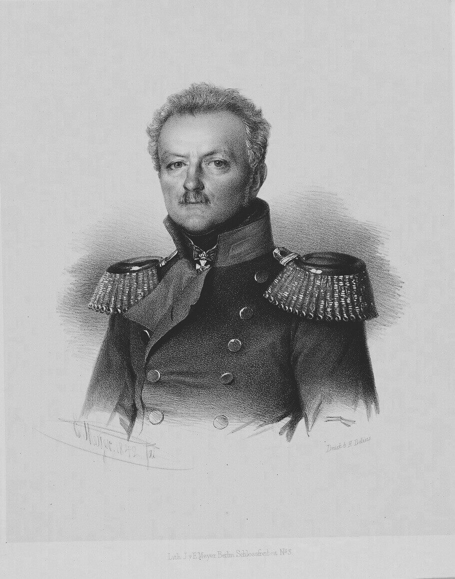 Christoph Alexander von Wulffen (1784-1861), preußischer Generalleutnant und Kommandant der Bundesfestung Luxemburg, Ritter des Roten Adlerordens erster Klasse mit Eichenlaub